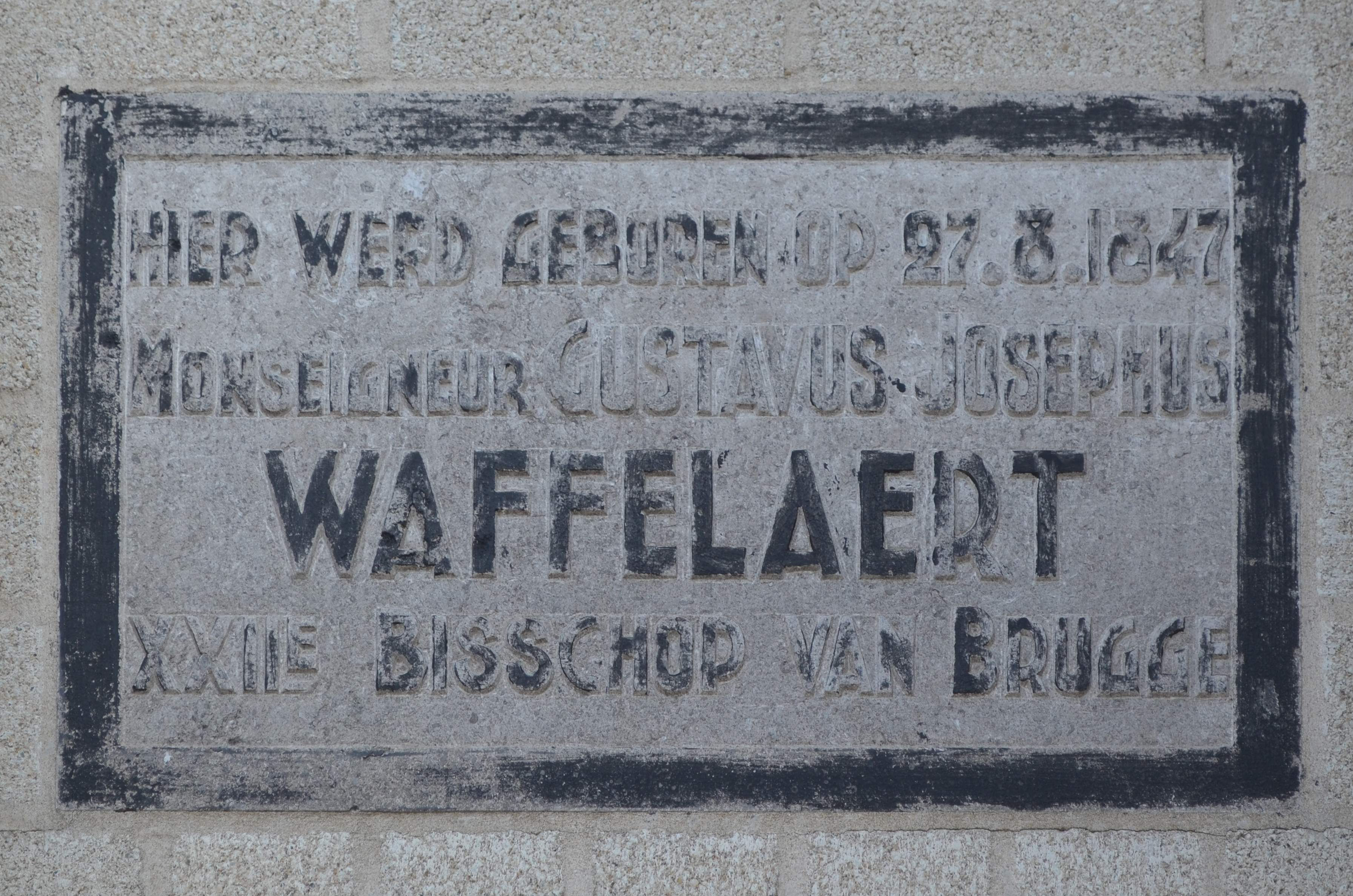 Rollegem (Kortrijk-België) - herdenkingsplaat geplaatst op de gevel van de woning in de Tombroekstraat 5. Text: Hier werd geboren op 27.8.1847 Monseigneur Gustavus Josephus Waffelaert XXIIe bisschop van Brugge